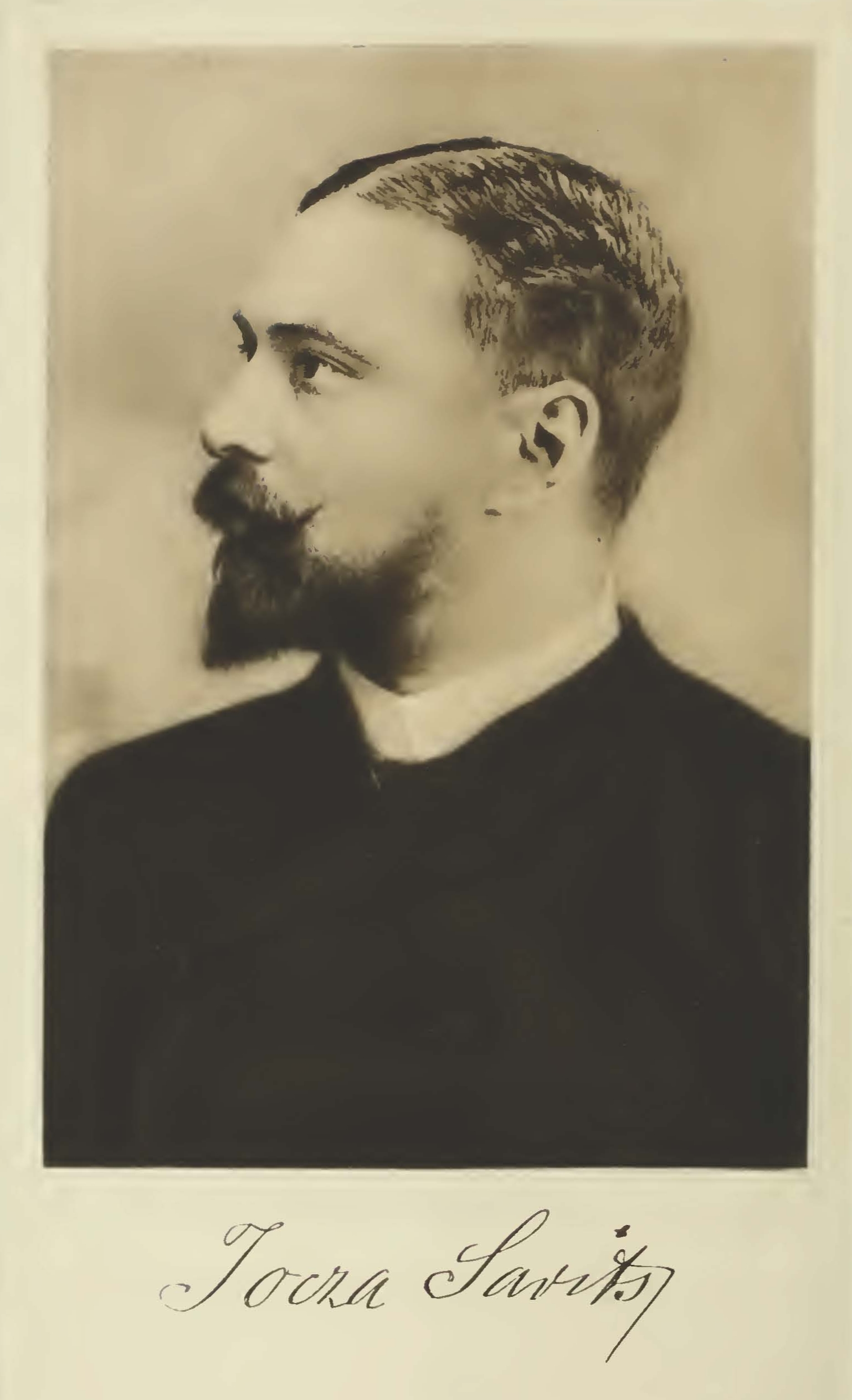 Jocza Savits (1847–1915), Schauspieler und Oberregisseur in München, Porträt mit Unterschrift.